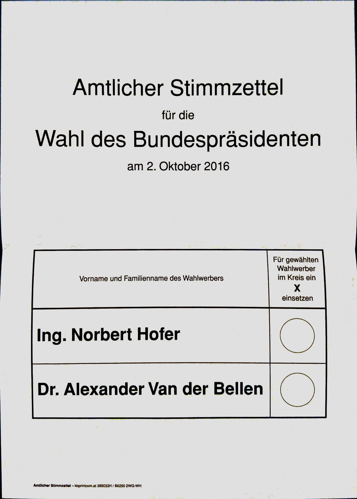 Amtlicher Stimmzettel der Bundespräsidentenwahl 2016 (3. Wahlgang)